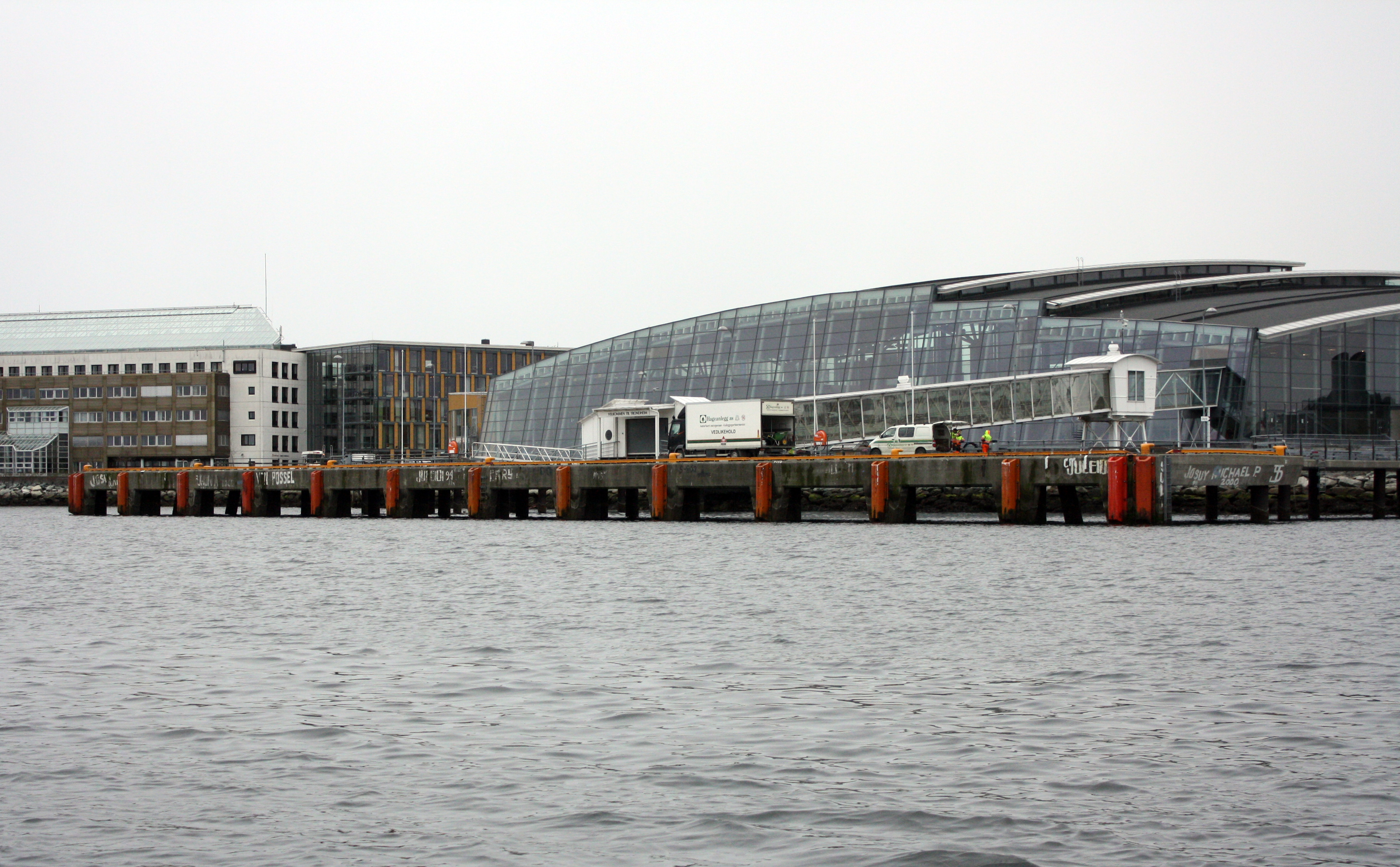 Kai 68 på Brattøra, hovedkaia for cruiseskip til Trondheim. Rett bak ligger Pirbadet, til venstre sees Pirsenteret.